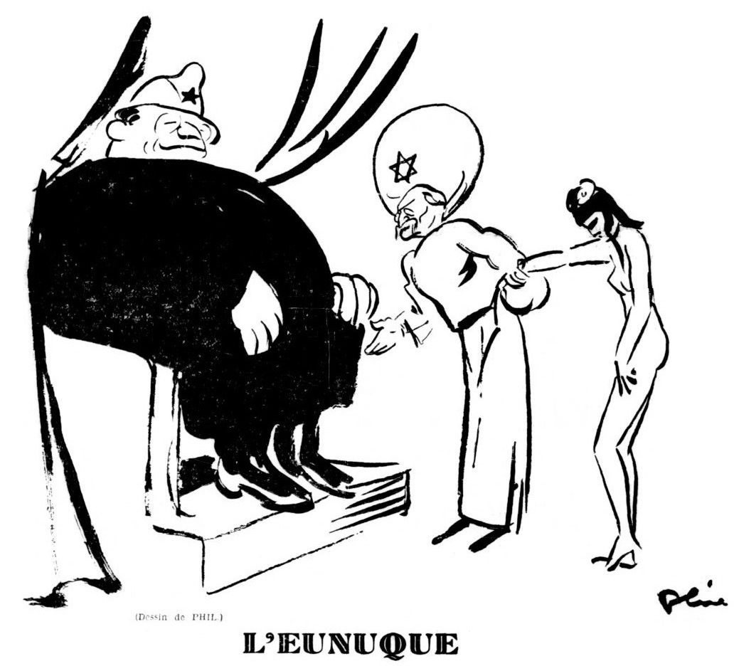 L'Eunuque.